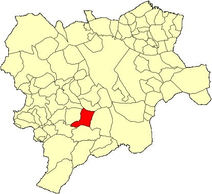 Mapa municipal de Albacete con el municipio de Ayna resaltado en rojo.